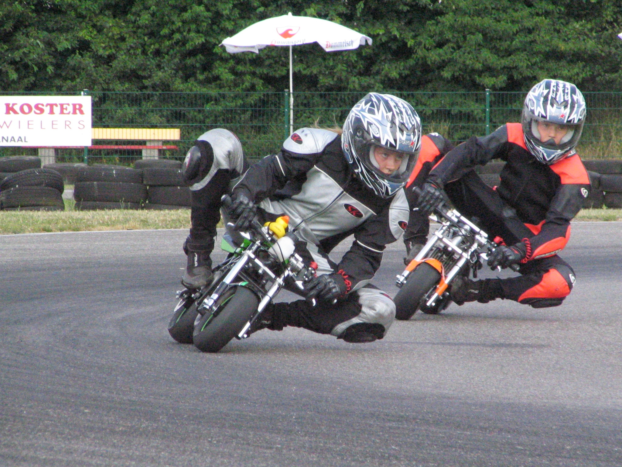 Nadieh and Ivar training at Stadskanaal